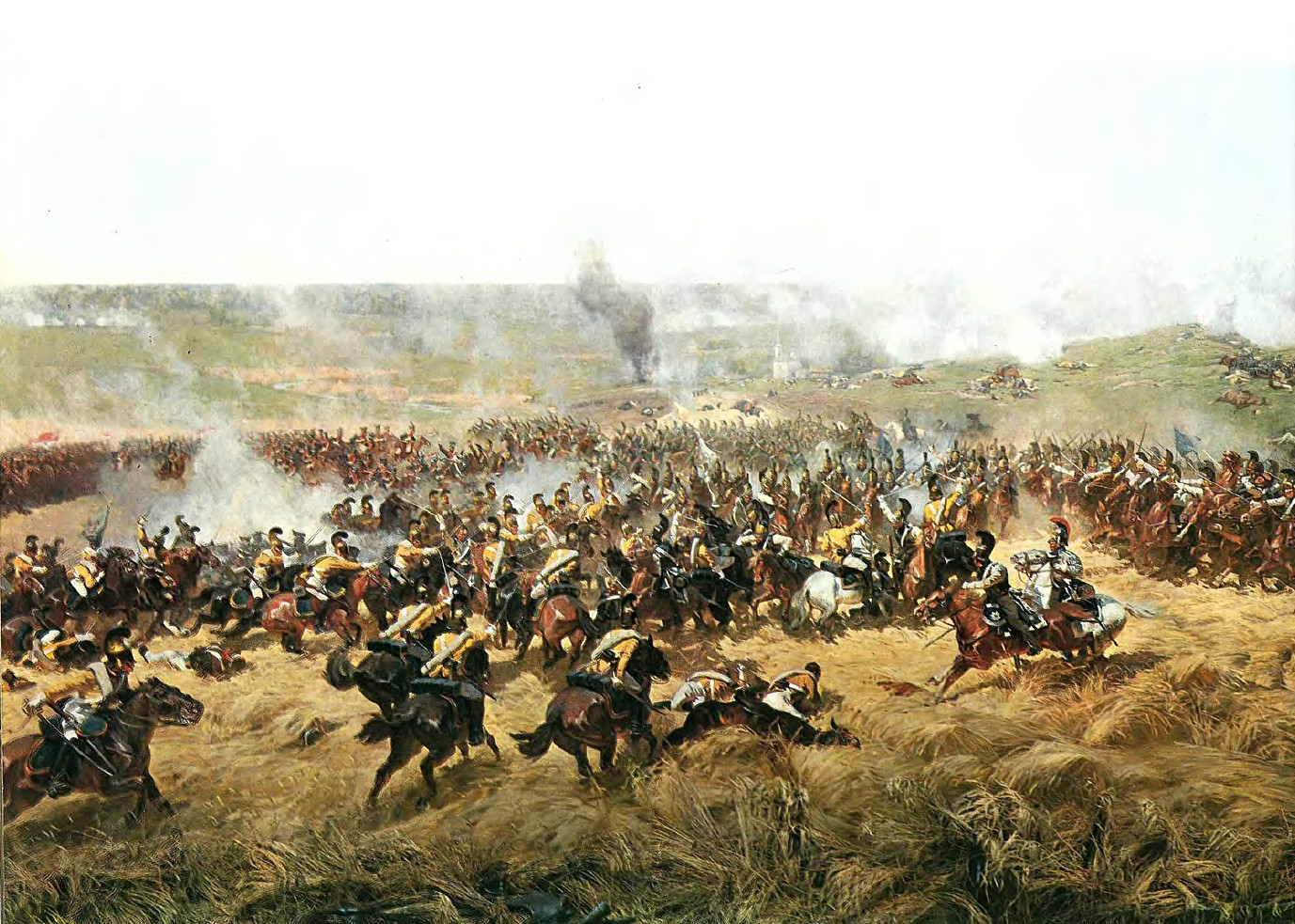 La bataille de la Moskova. Positions à 12h30.